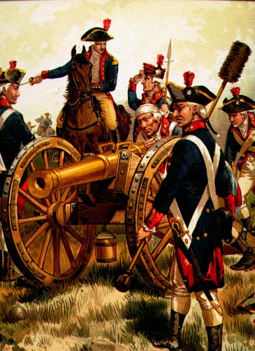 Artillerie der Kontinentalarmee, 1777-1783